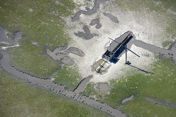 Hortobágy légi felvételen